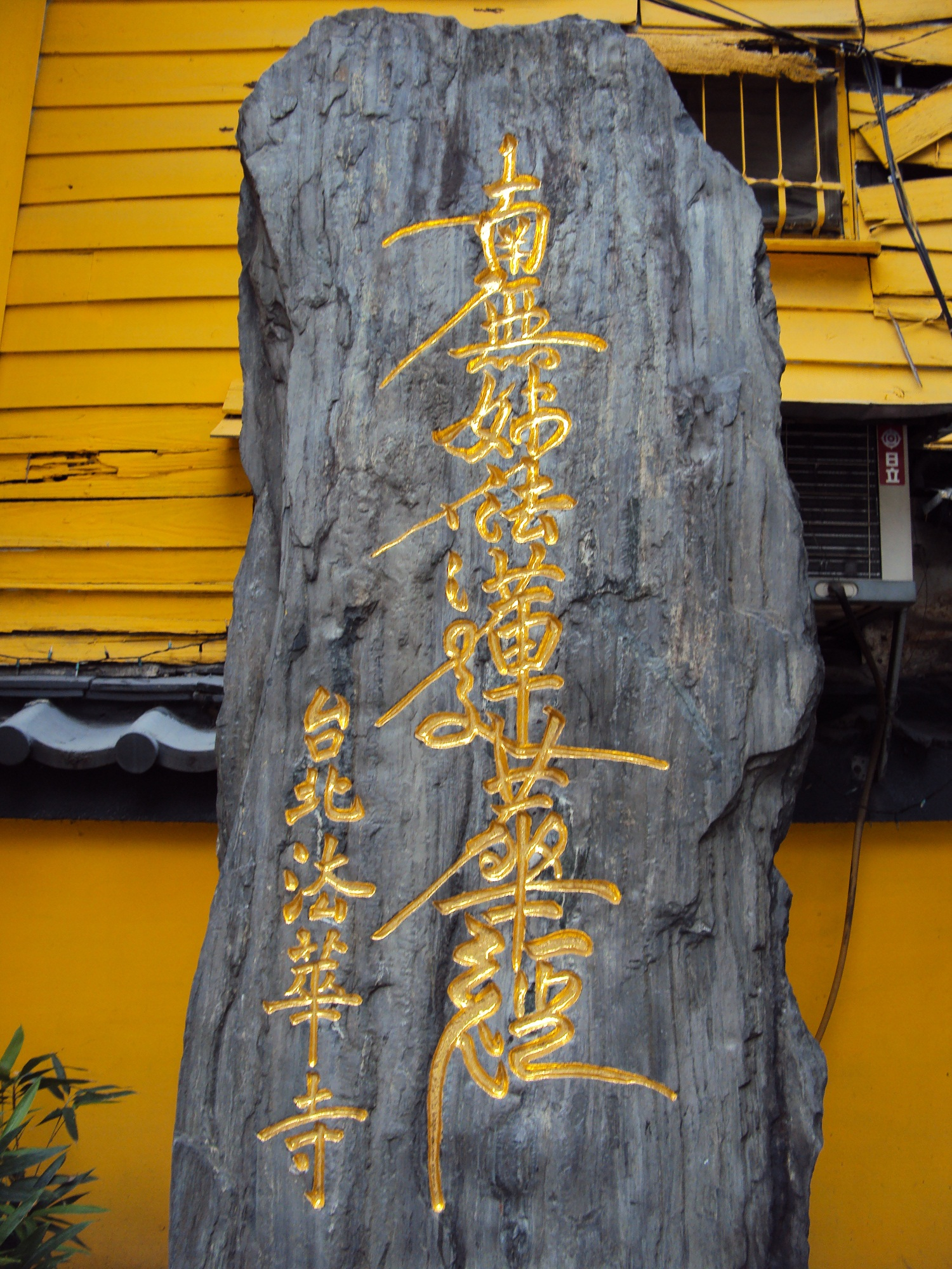 台北法華寺の法華寺碑。